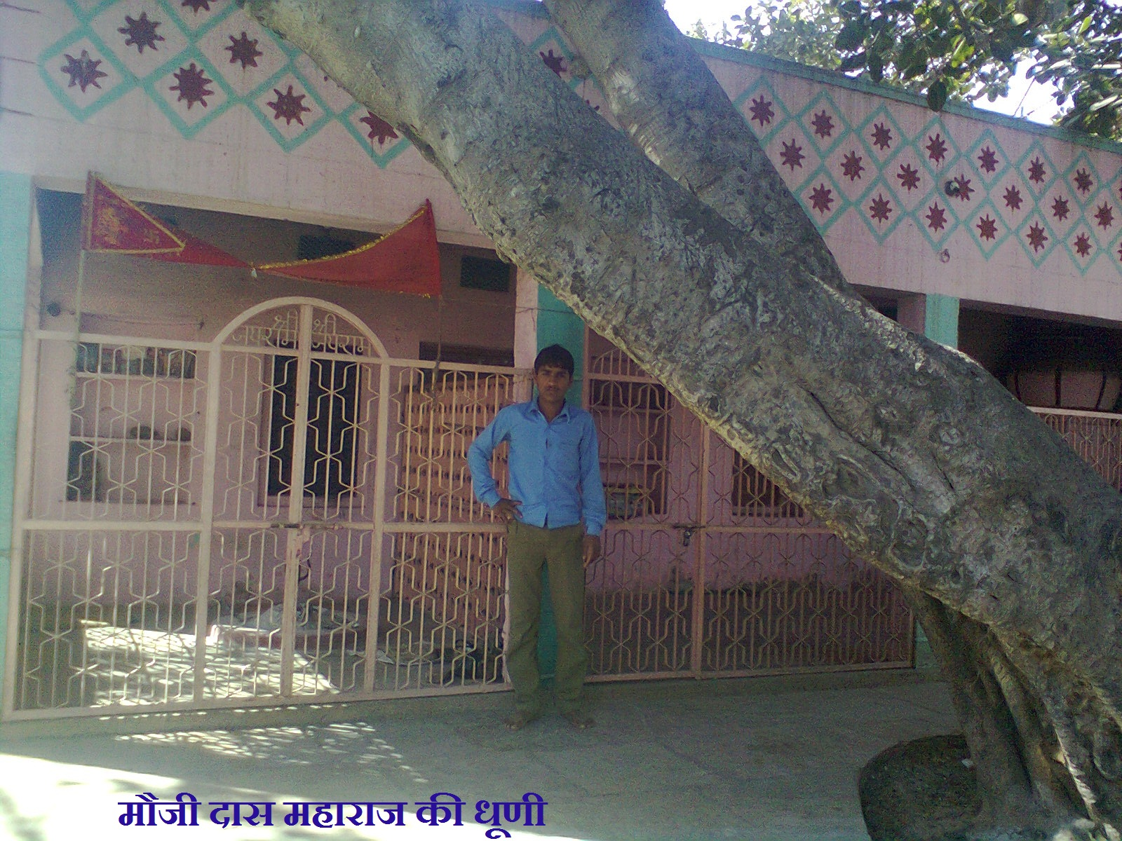 सांगलिया पीठ के अधीन ग्राम मीठड़ी मारवाड़ में स्थापित धूणी, जो मौजी दास जी की धूणी के नाम से प्रसिद्ध है। यह हिन्दू मुस्लिम दोनों ही धर्मों के ग्राम जनों का श्रद्धा का केन्द्र है।